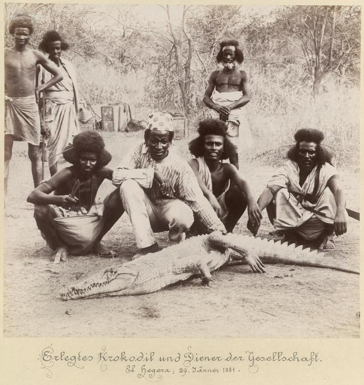 Erlegtes Krokodil am Fluss Setit mit Jägern